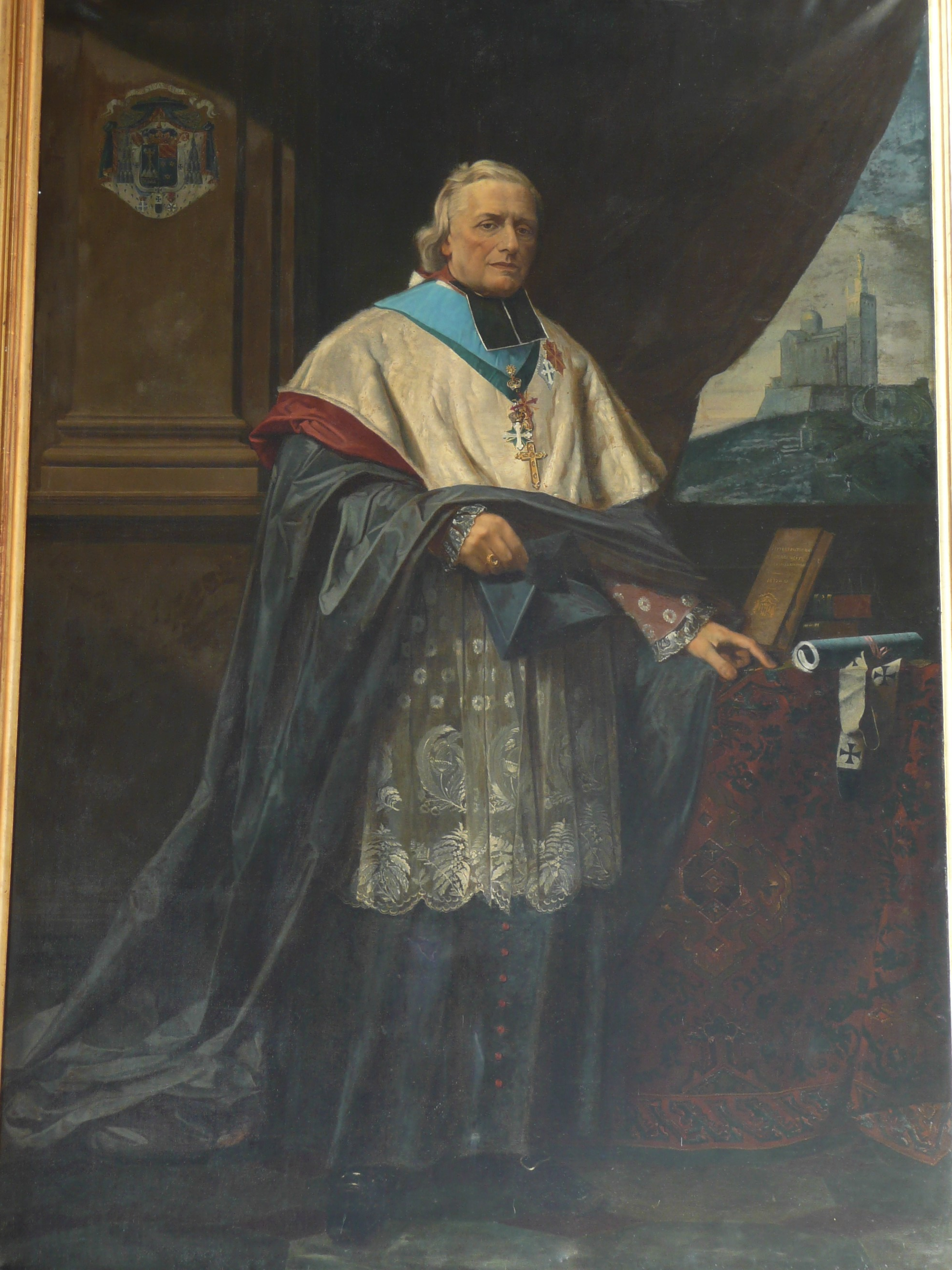 A Marseille (Bouches-du-Rhône, France), intérieur de la cathédrale Sainte-Marie-Majeure ou nouvelle Major par opposition à l'ancienne cathédrale romane juste à côté, chapelle axiale abritant le tombeau de monseigneur Eugène de Mazenod, saint et évêque de Marseille.